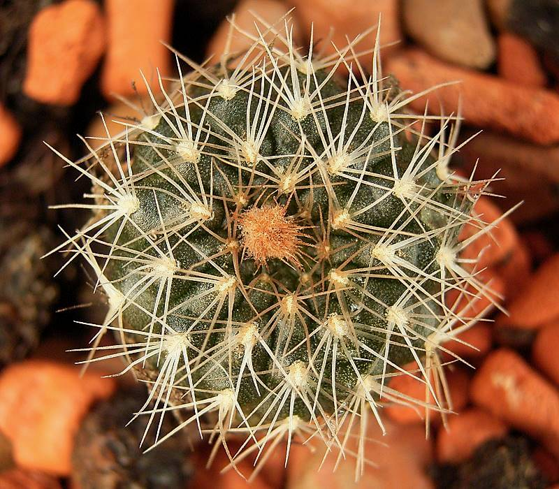 Frailea pymgmaea